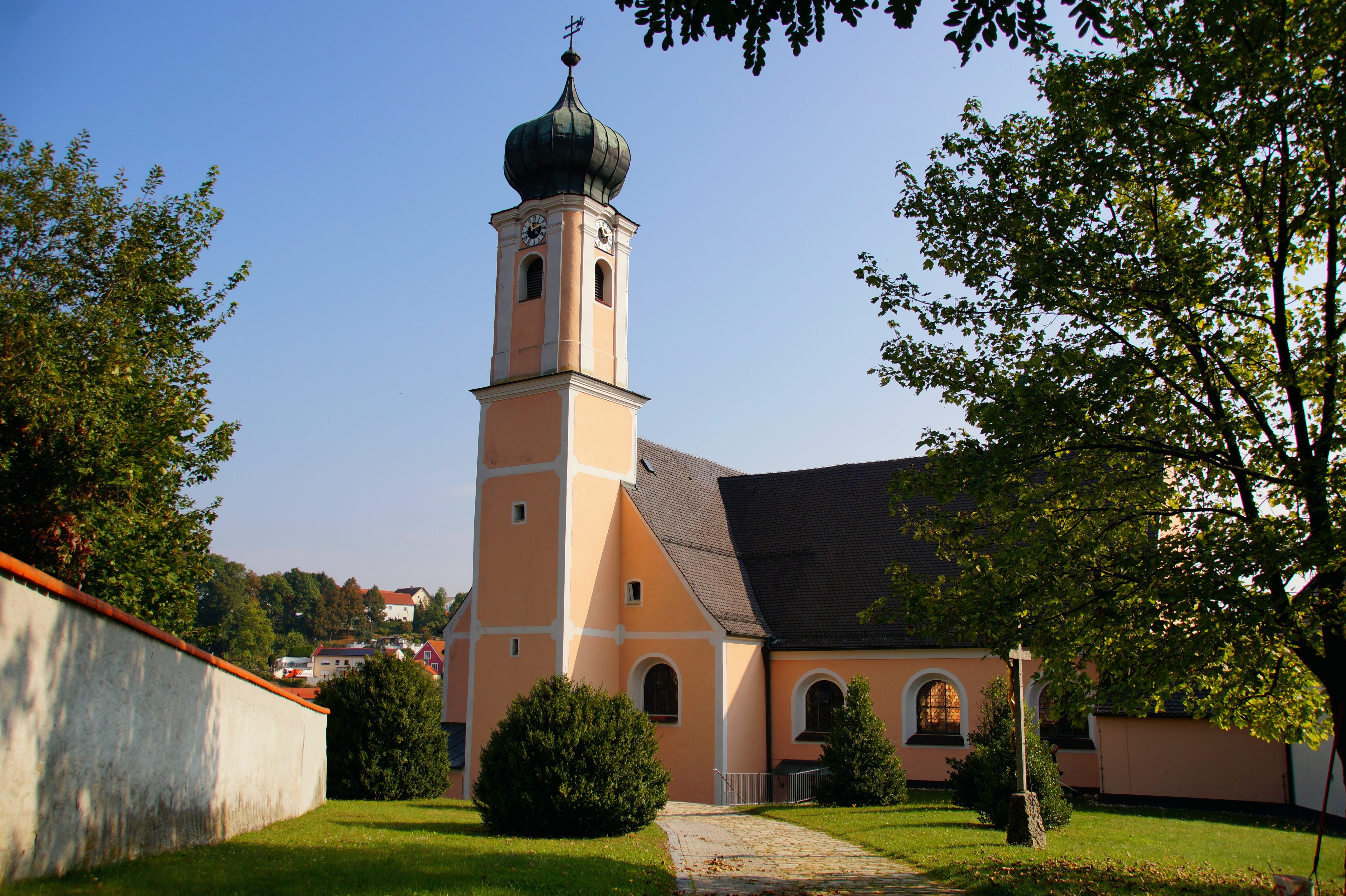 Laaber Kath. Pfarrkirche St. Jakobus